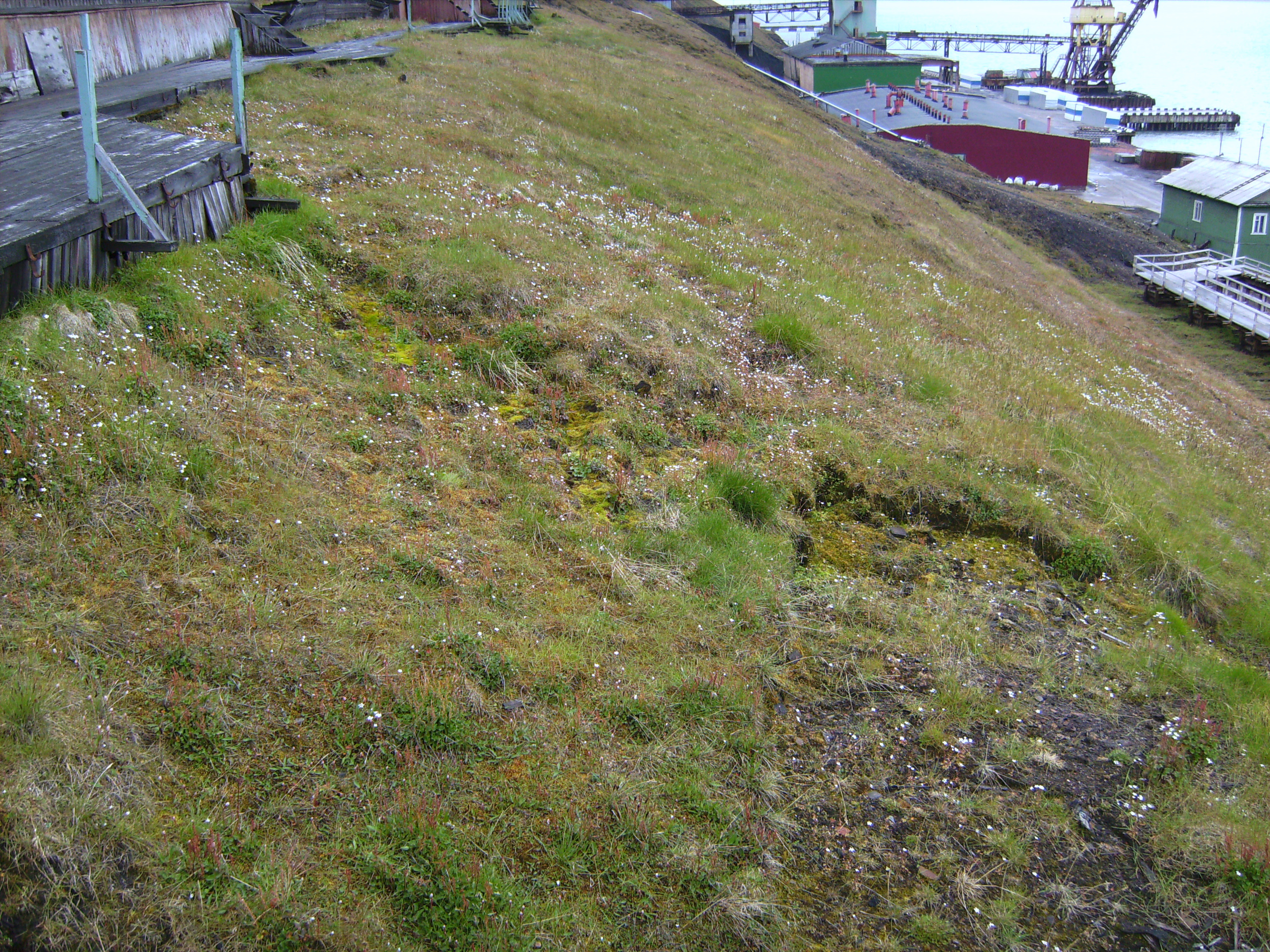 Tundra in slope at Barentsburg, Svalbard